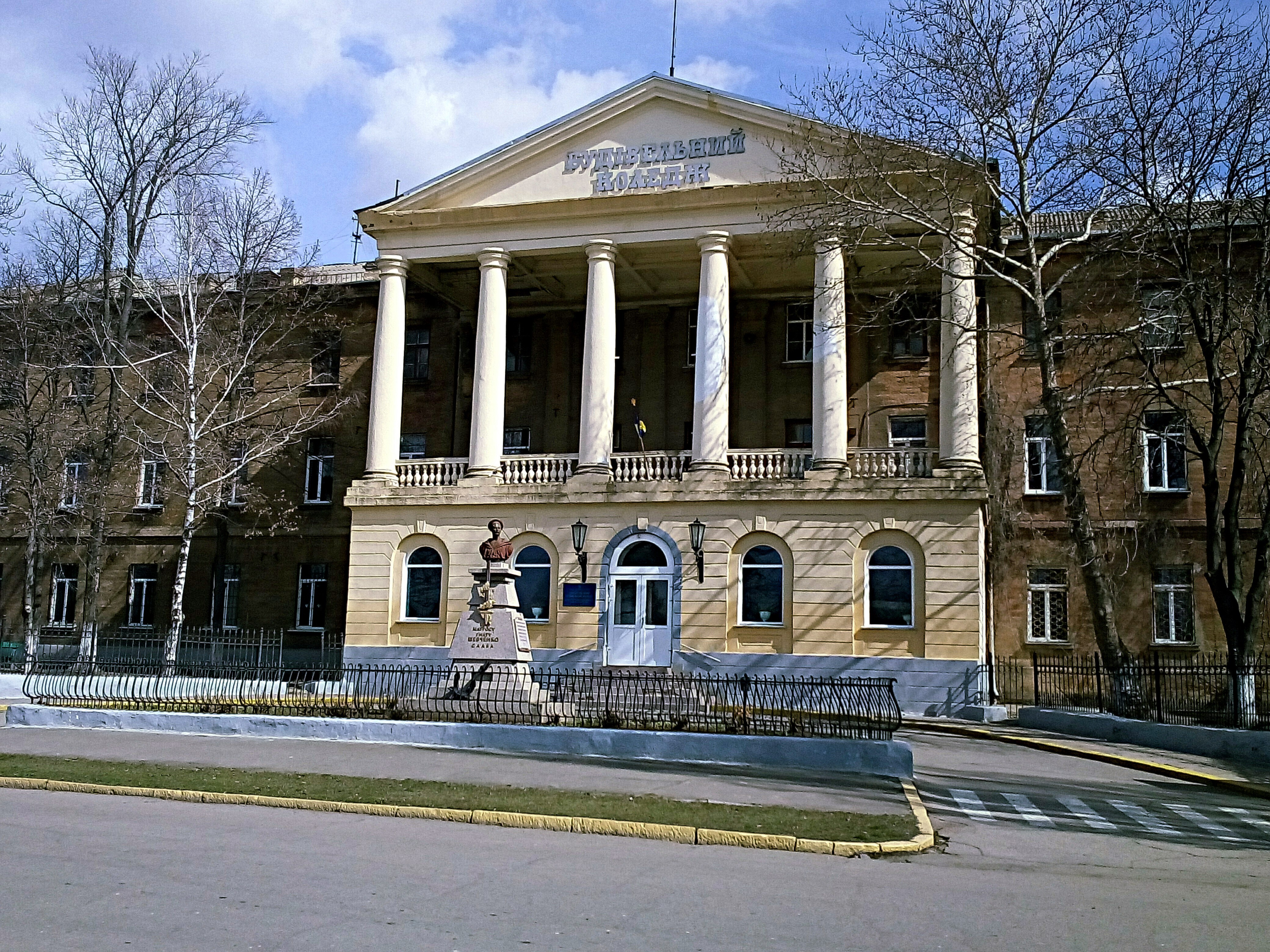 Будівельний коледж (Пам'ятник Гнату Шевченко, Старофлотські казарми), Миколаїв